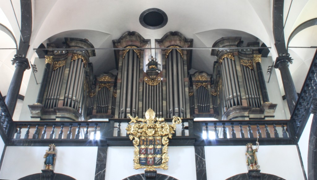 Pfarr- und Wallfahrtskirche Sachseln, Schweiz, Orgelprospekt